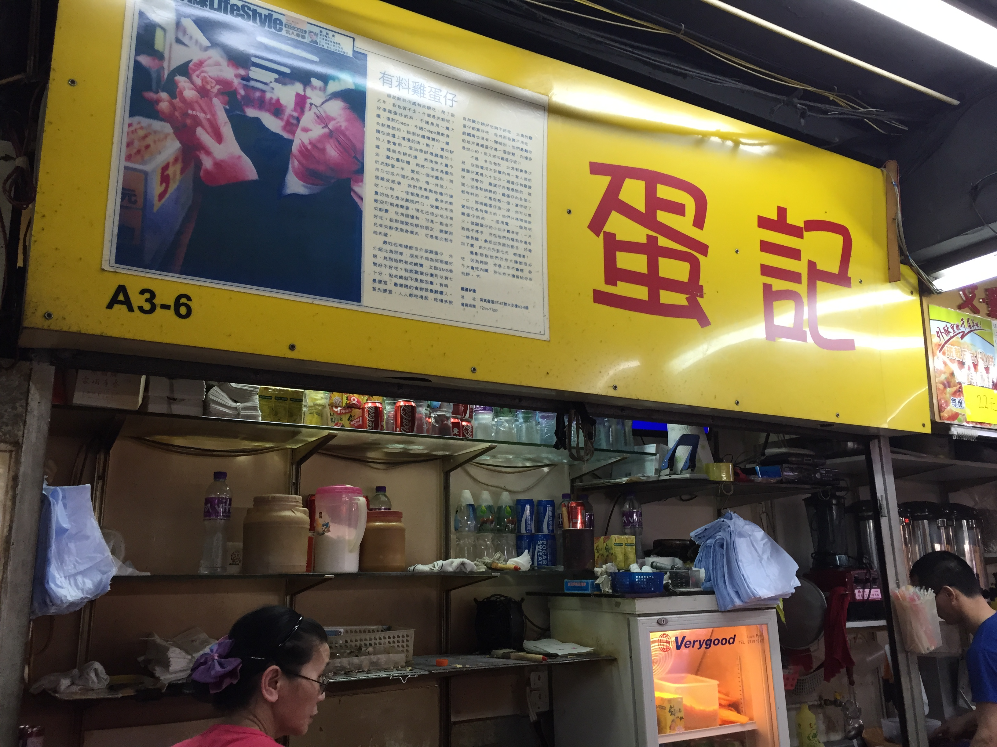 Egg Waffle @ Dan Kee